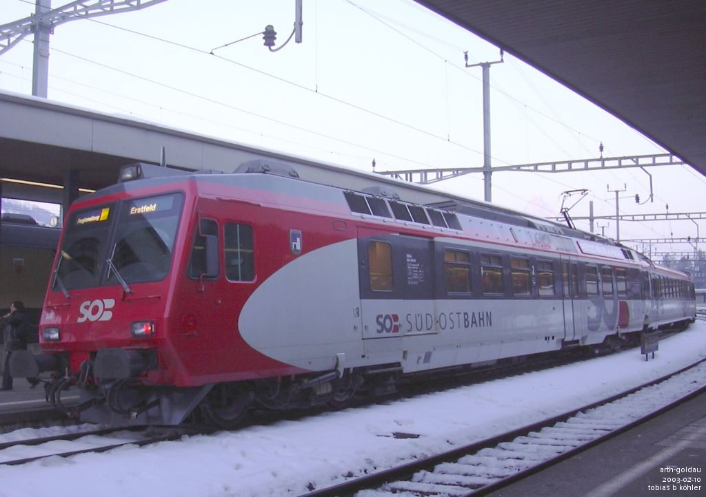 Swiss Südostbahn RBDe 566 trainset in Arth-Goldau on 2003-02-10